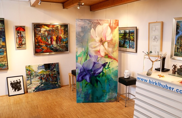 Atelier Birklhuber 2019